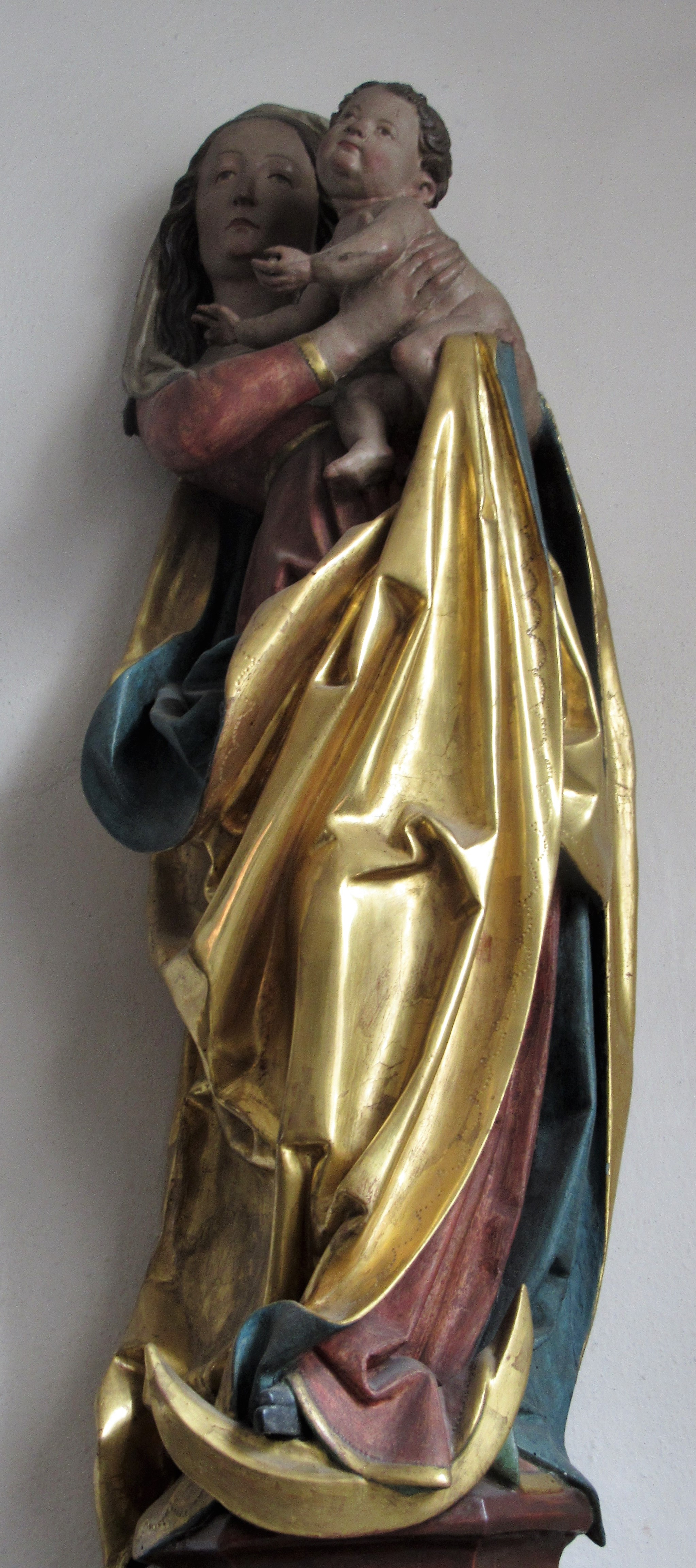 Muttergottes Burglauer